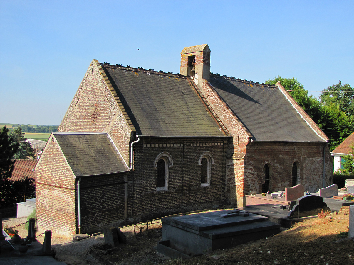 Saint-Aubin église